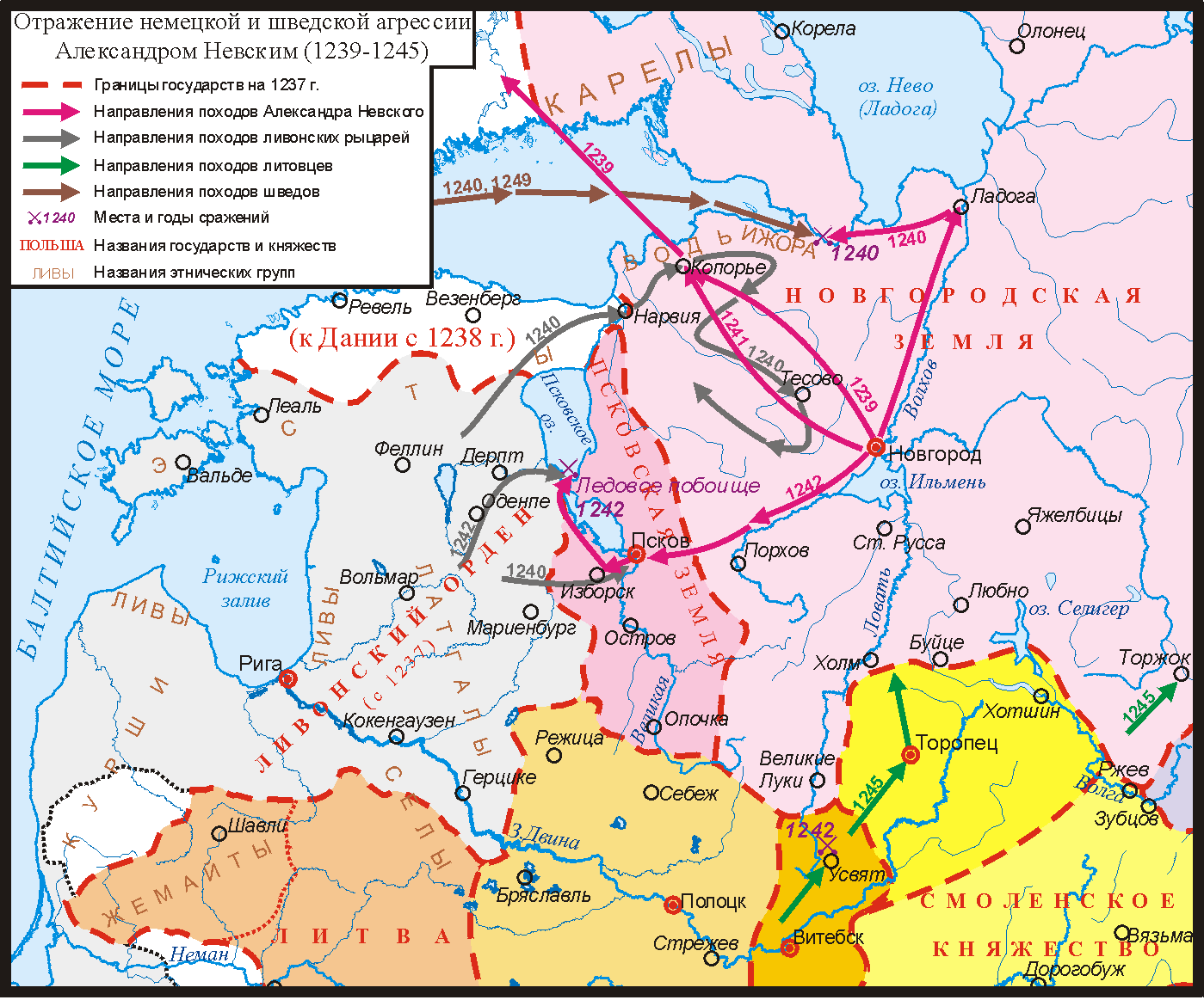 Отражение немецкой и шведской агрессии Александром Невским (1239-1245)